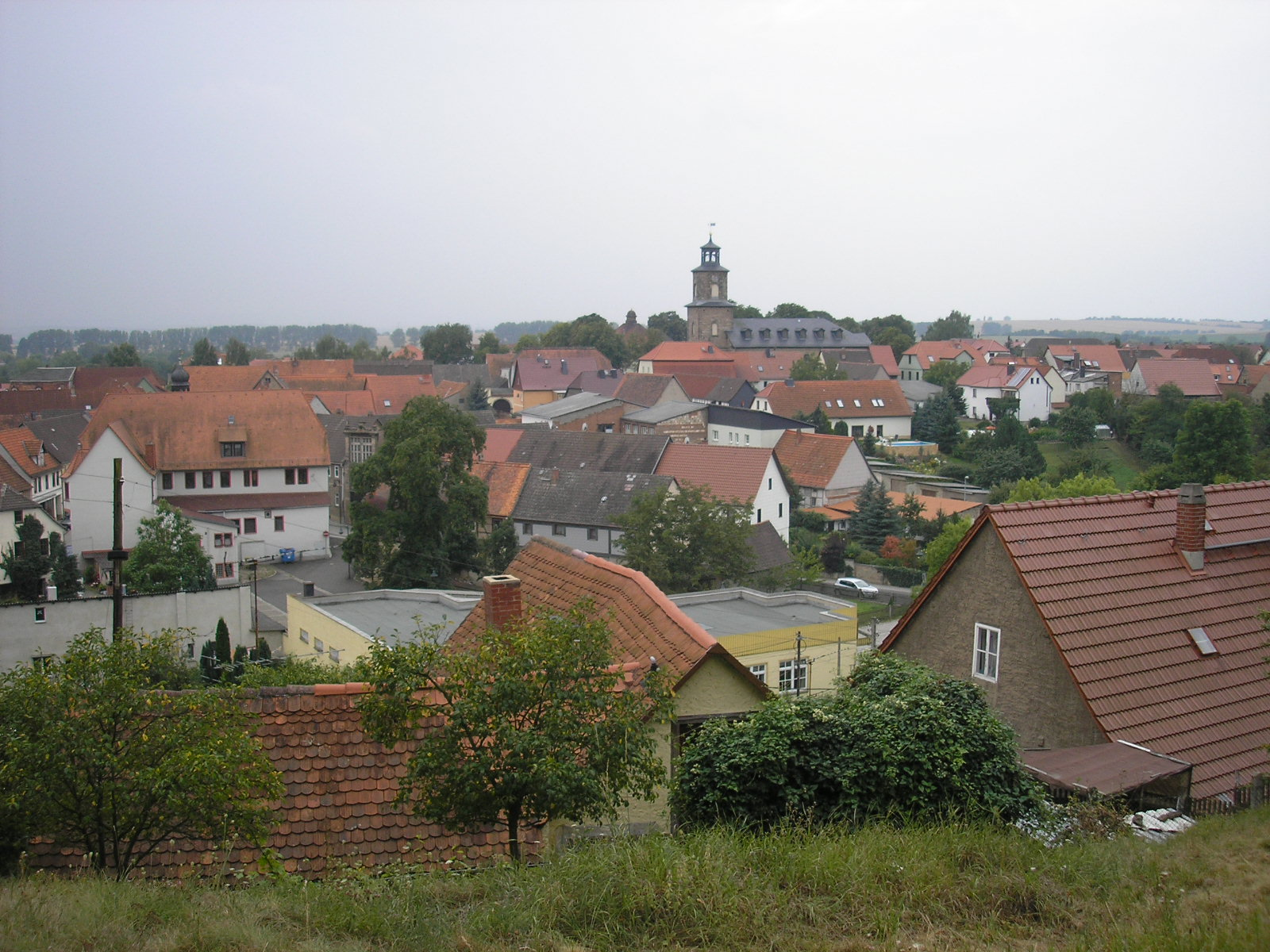 Blick über die Stadt Rastenberg (Thüringen).